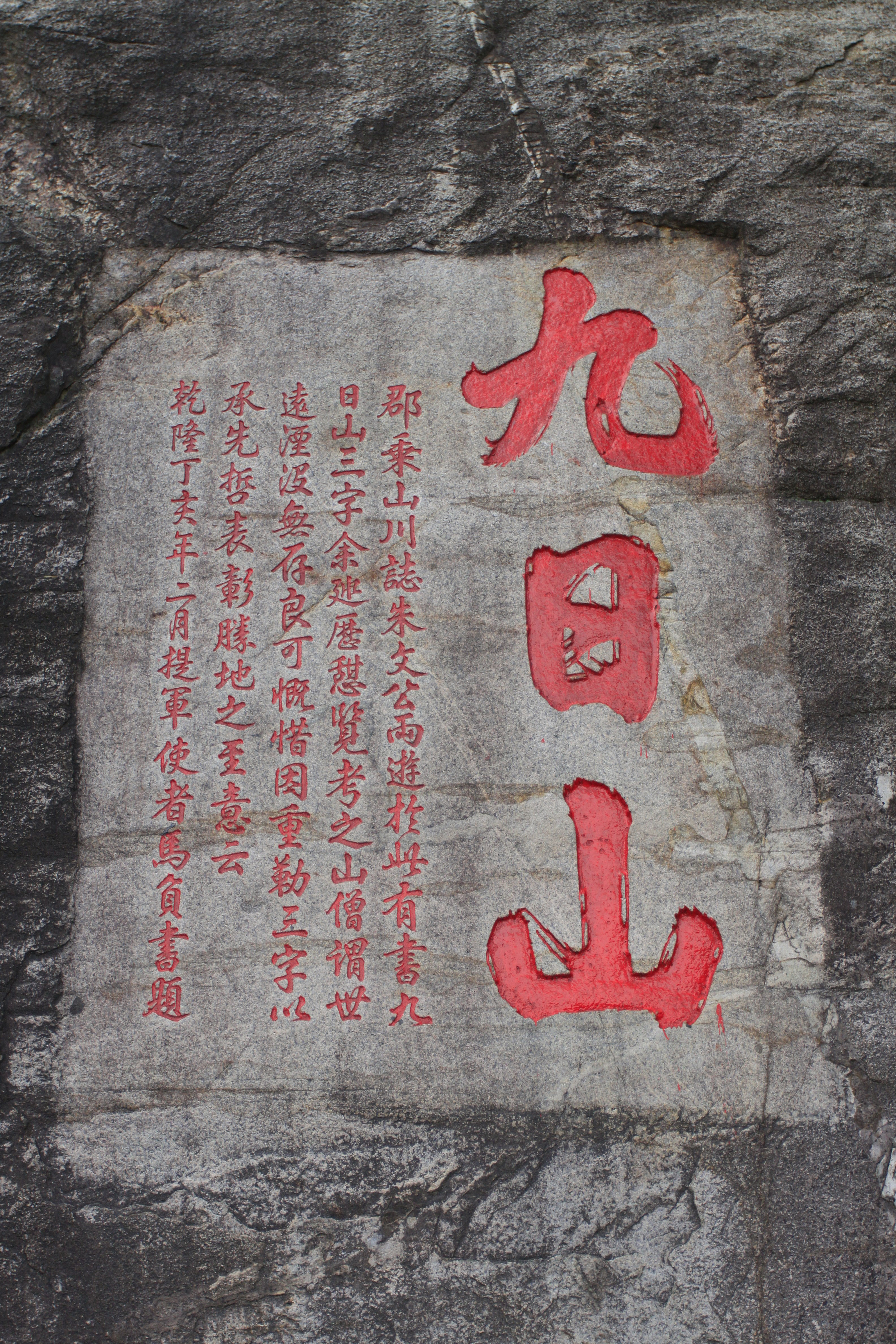 九日山，位于中国福建省泉州市，九日山摩崖石刻是全国重点文物保护单位。